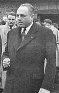 Portrait Gilbert Grandval